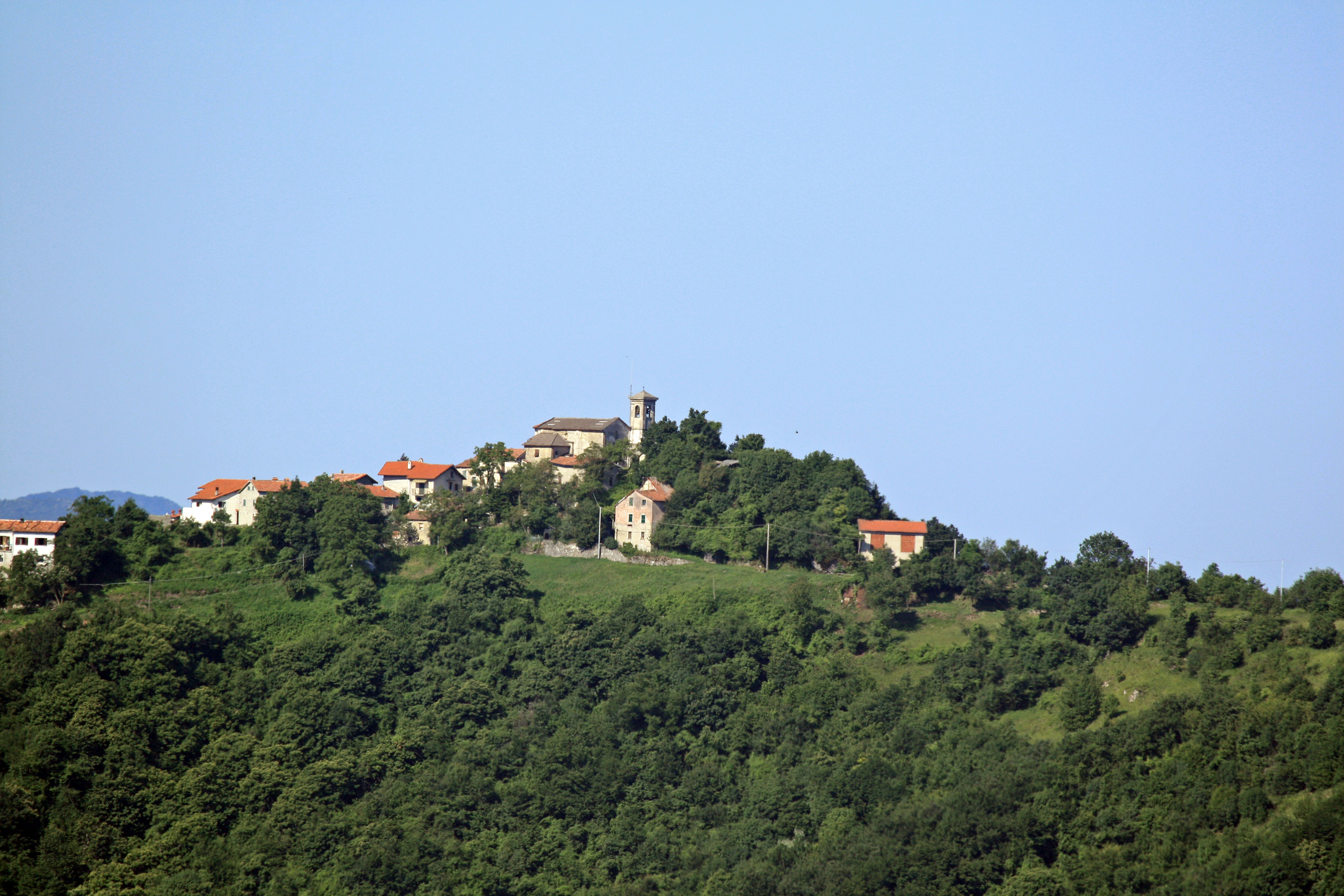 Montecanne di Isola del Cantone (GE) in valle Spinti.